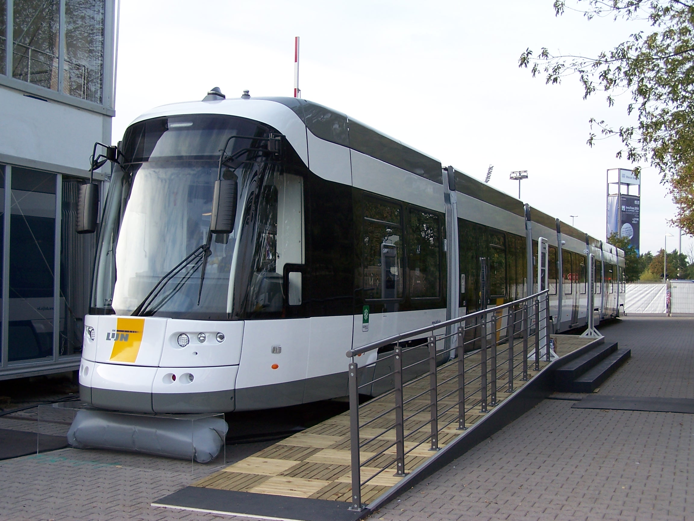 Bombardier Flexity 2 für die Straßenbahn Gent von De Lijn betrieben auf der Innotrans 2014 in Berlin.